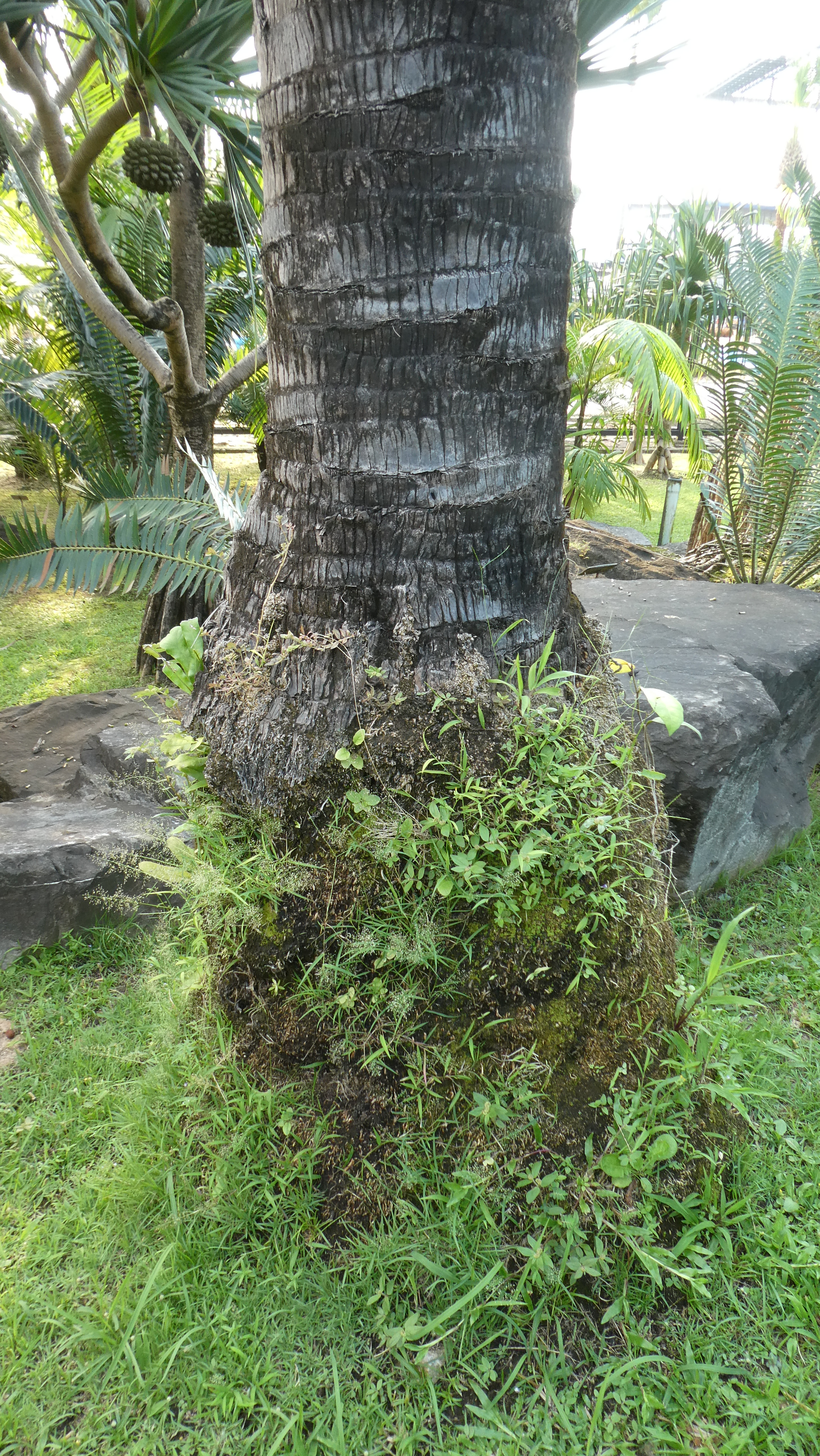 Le bas du stipe du Medemia argun du Jardin Botanique de Nong-Nooch en Thaïlande